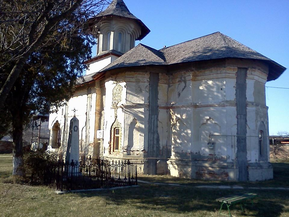 Biserica Galbenă „Sf. Dimitrie”, „Sf. Nicolae”